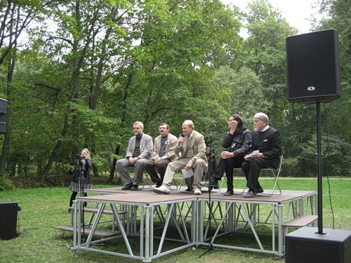 Жюри литературного конкурса "Ясная Поляна" в 2010 году. Объявление лауреатов в номинации «XXI век»